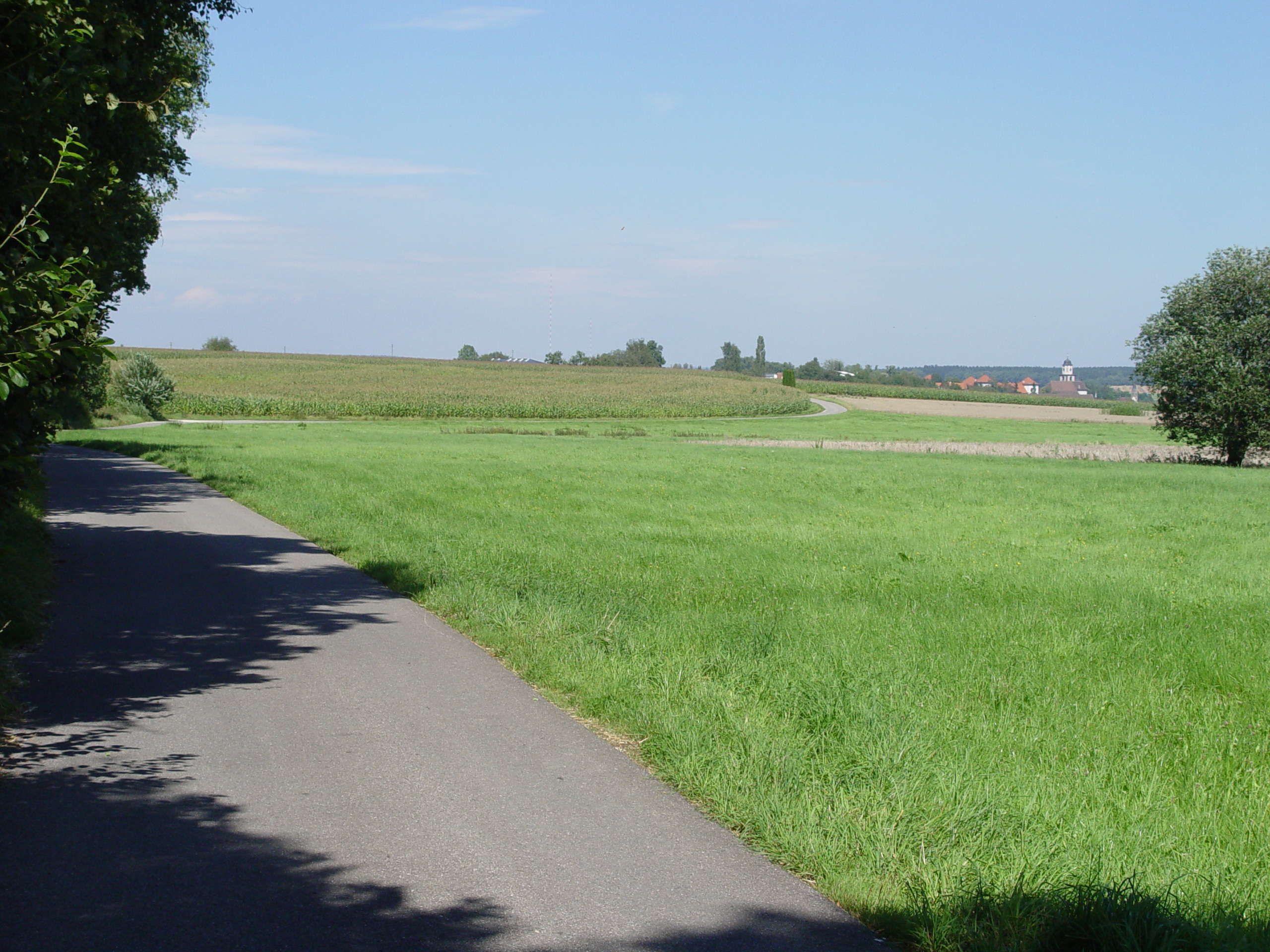 "Der Feldweg" (Heidegger) in Meßkirch, Deutschland